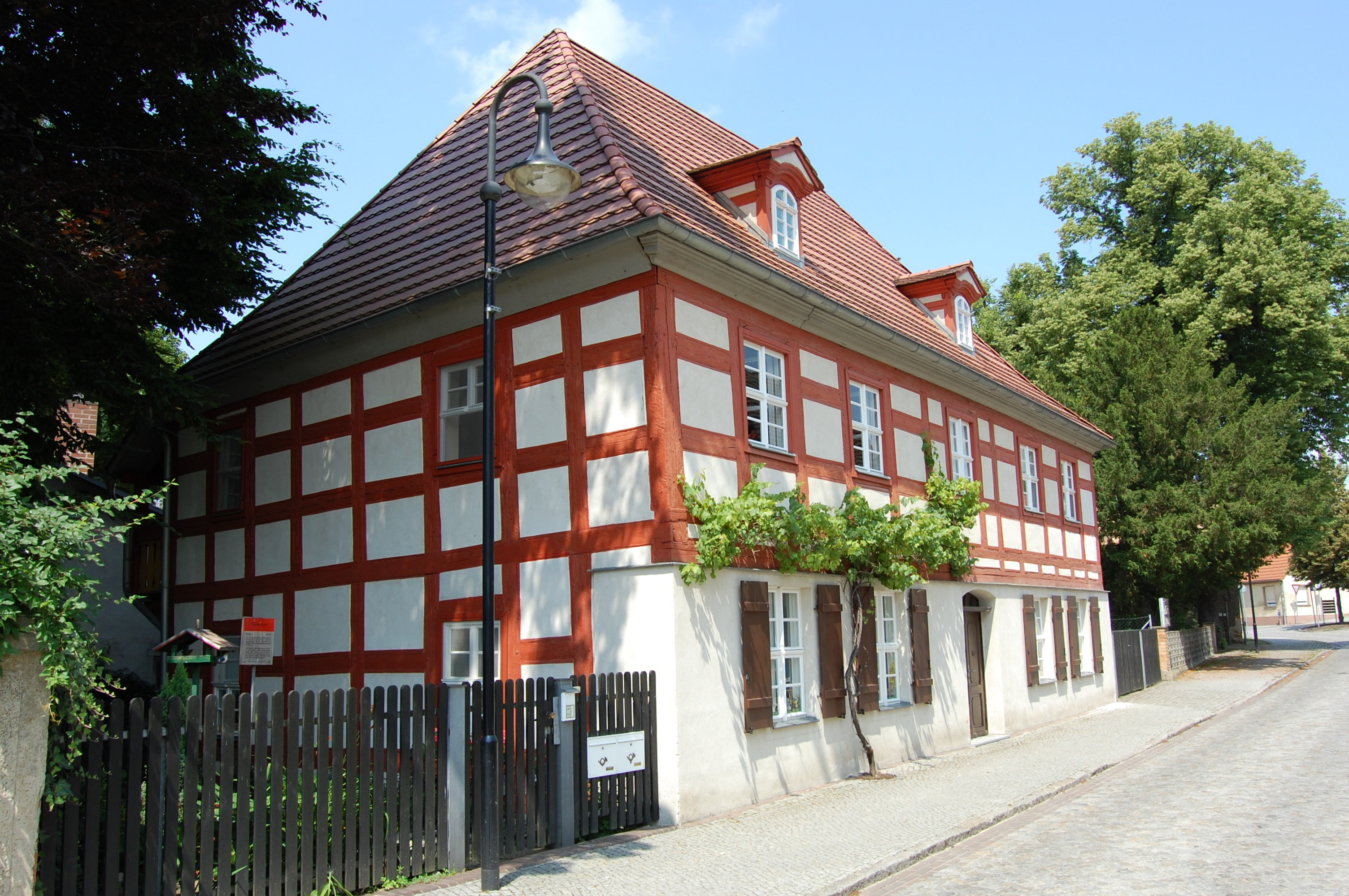 als ältestes Haus bezeichnetes Fachwerkgebäude in Vetschau/Spreewald, gebaut um 1710 Hornjoserbsce: Tykowana chěžka we Wětošowje, kotraž płaći jako najstarše domske w městačku